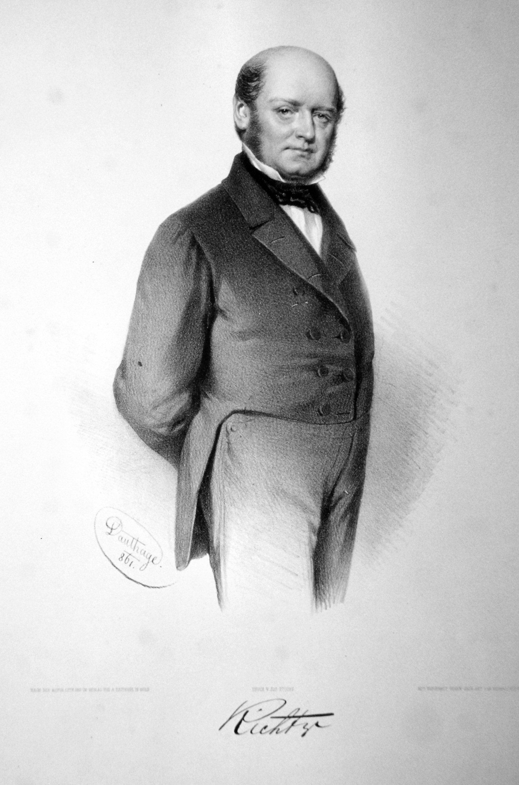 Franz Richter (1810-1861), Industrieller, Bankdirektor. Lithographie von Adolf Dauthage, 1861